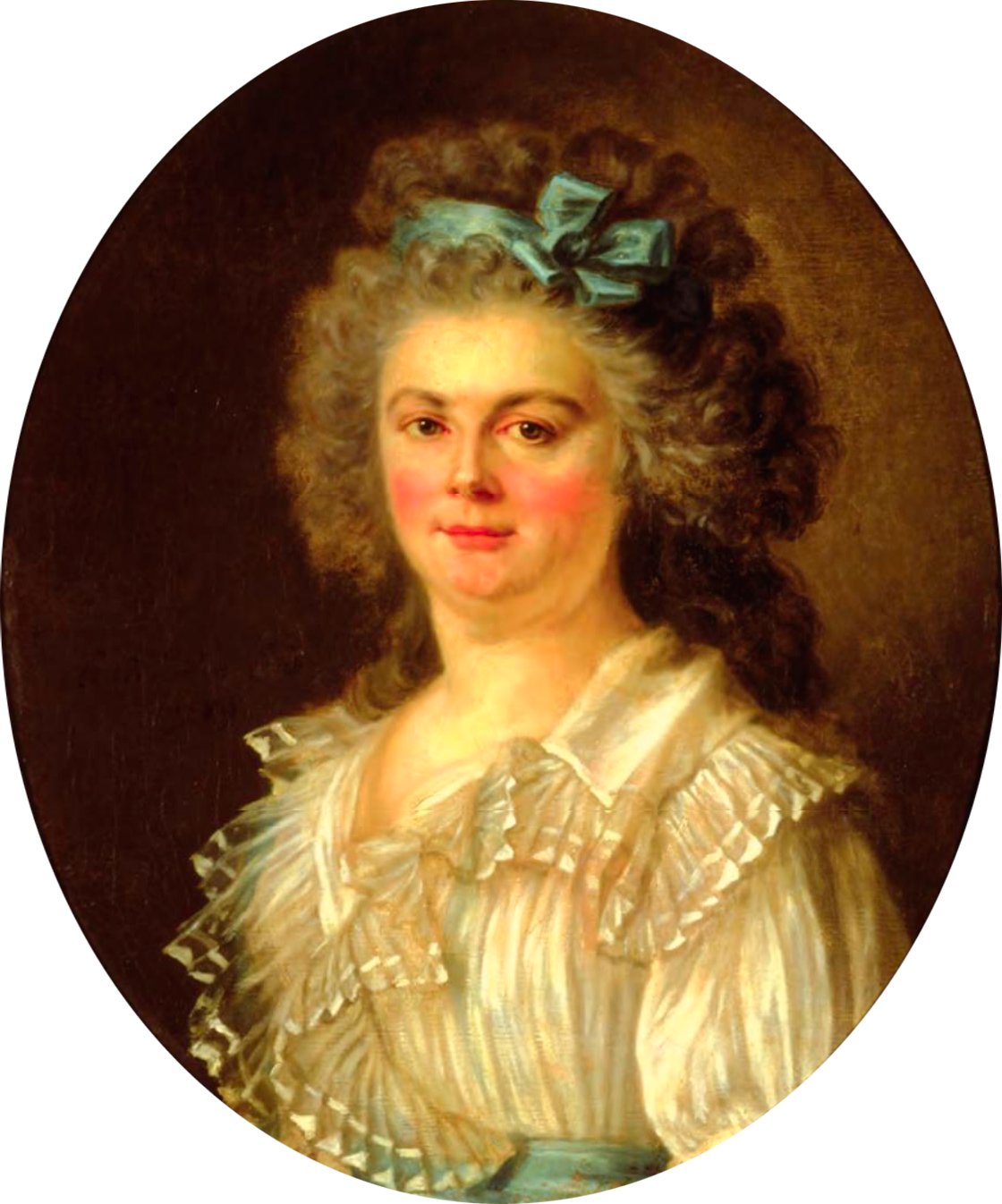 Portrait présumé de Mlle Bertin, reproduit dans Autour des Van Loo: Peinture, commerce des tissus et espionnage en Europe (1250-1830), p. 308.